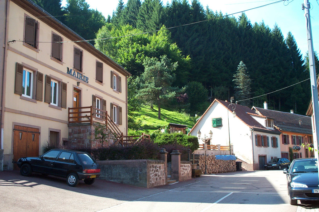 Mairie de la ville de Grandfontaine, Bas-Rhin, Vallée de la Bruche, Alsace